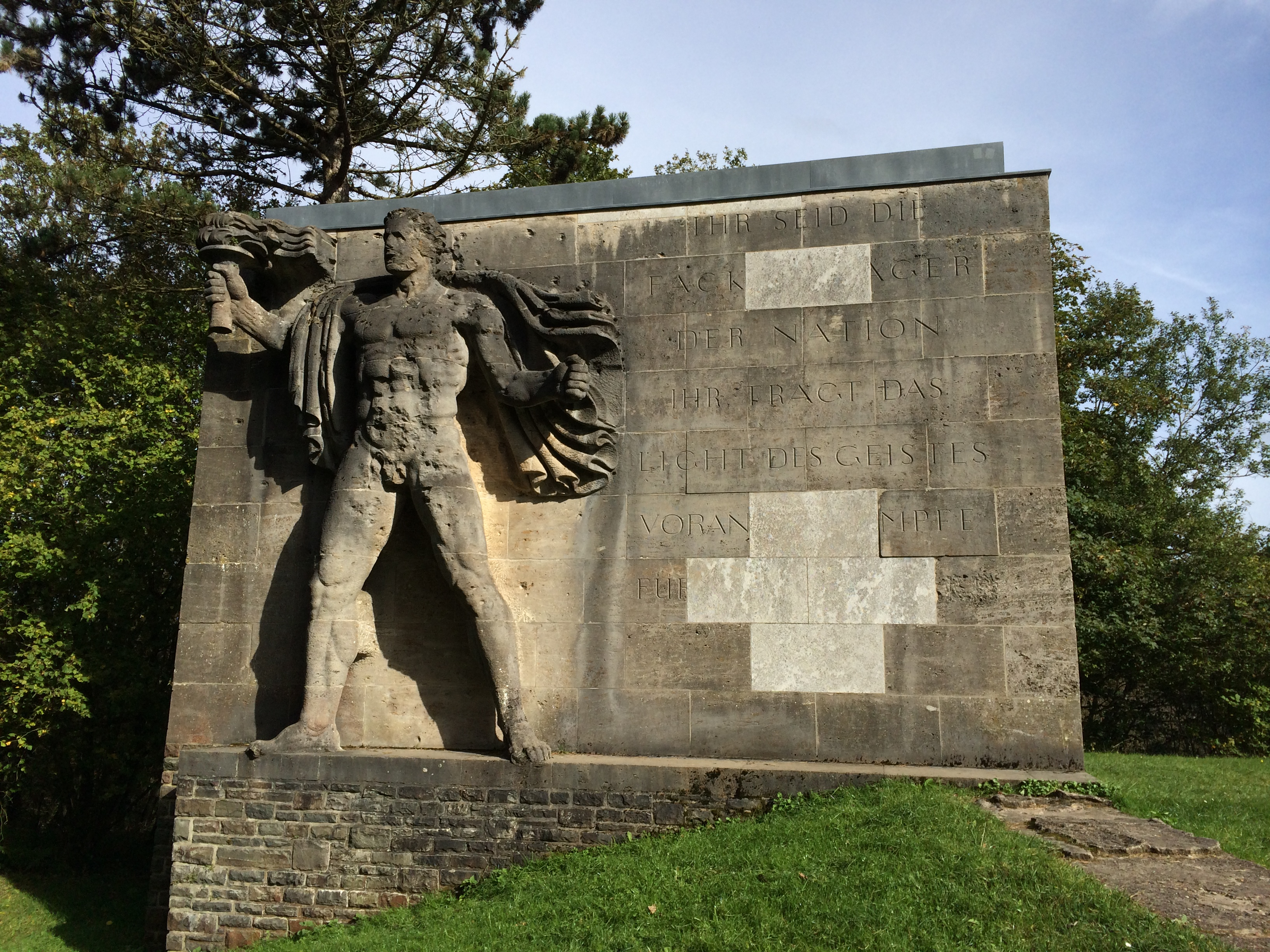 Willy Meller - Fackelträger